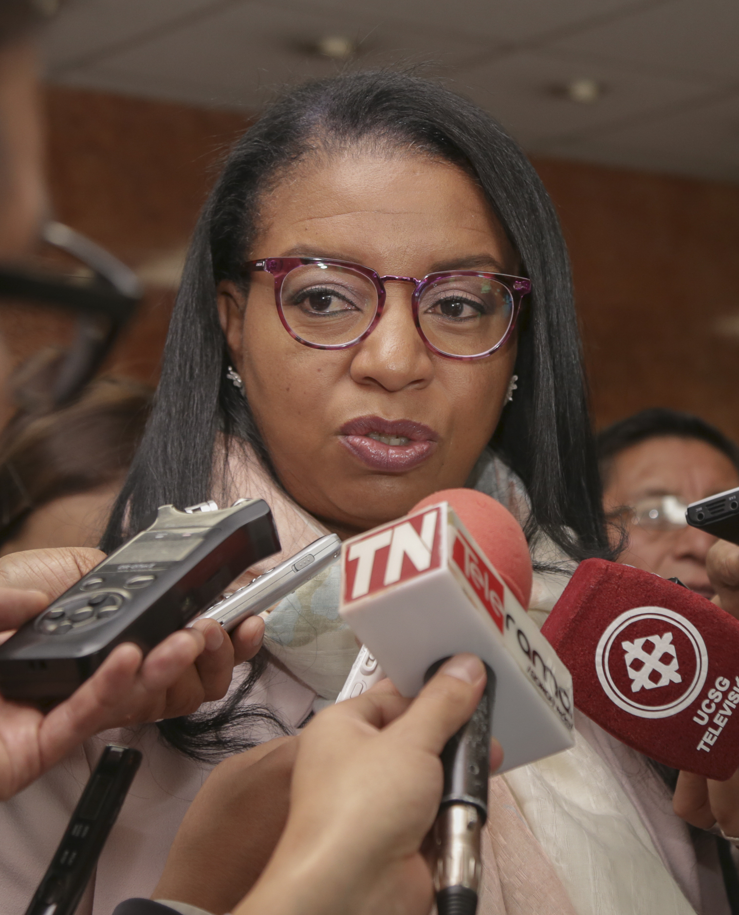 Rueda de Prensa de la Asambleísta Elzabeth Cabezas. Tema: Resultados Oficiales Electorales oficiales de la Consulta Popular y el triunfo de la Democracia. Fotografías por: Arisha Priodl / Asamblea Nacional. 9 de Febrero de 2018 - Rueda de Prensa de la Asambleísta Elzabeth Cabezas. Rueda de Prensa de la Asambleísta Elzabeth Cabezas. Tema: Resultados Oficiales Electorales oficiales de la Consulta Popular y el triunfo de la Democracia. Fotografías por: Arisha Priodl / Asamblea Nacional.